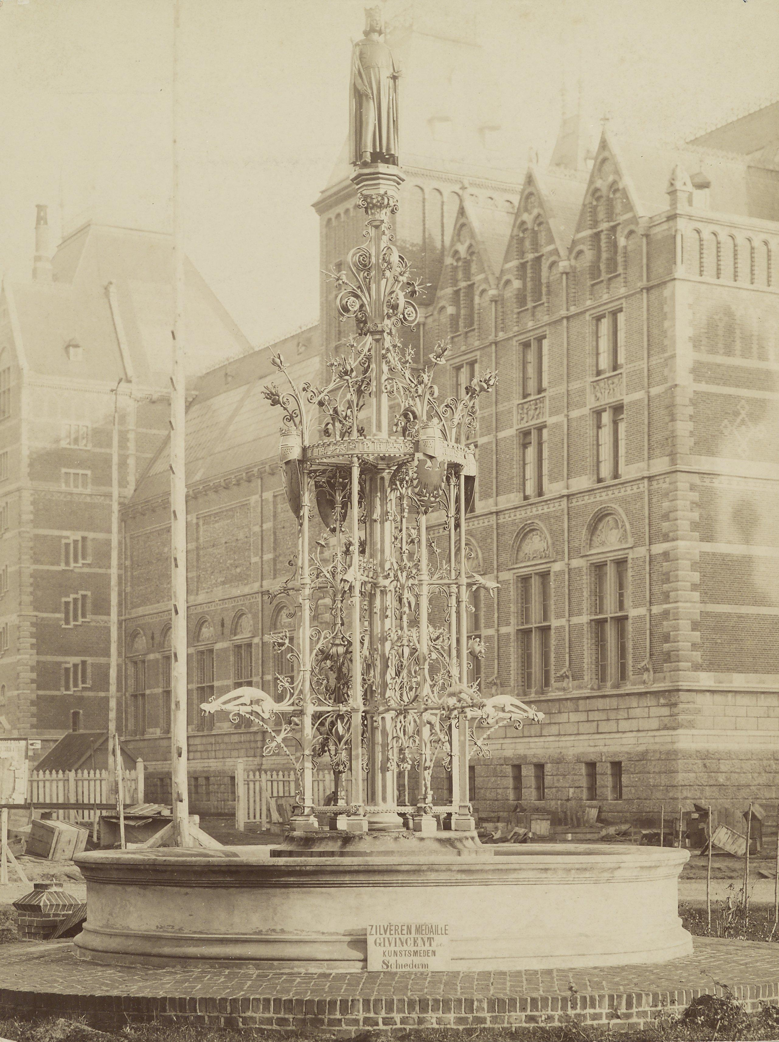 Fontein in opbouw, bestemd voor het Binnenhof te Den Haag, staande op het Museumplein in Amsterdam tijdens de Wereldtentoonstelling. Op de achtergrond het Rijksmuseum, gezien vanuit de Jan Luijkenstraat. Bordje: Zilveren Médaille G.I. Vincent & Co Kunstsmeden Schiedam, Bijschrift: Fontein voor het Binnenhof 1883, zie ook neg 36.039.